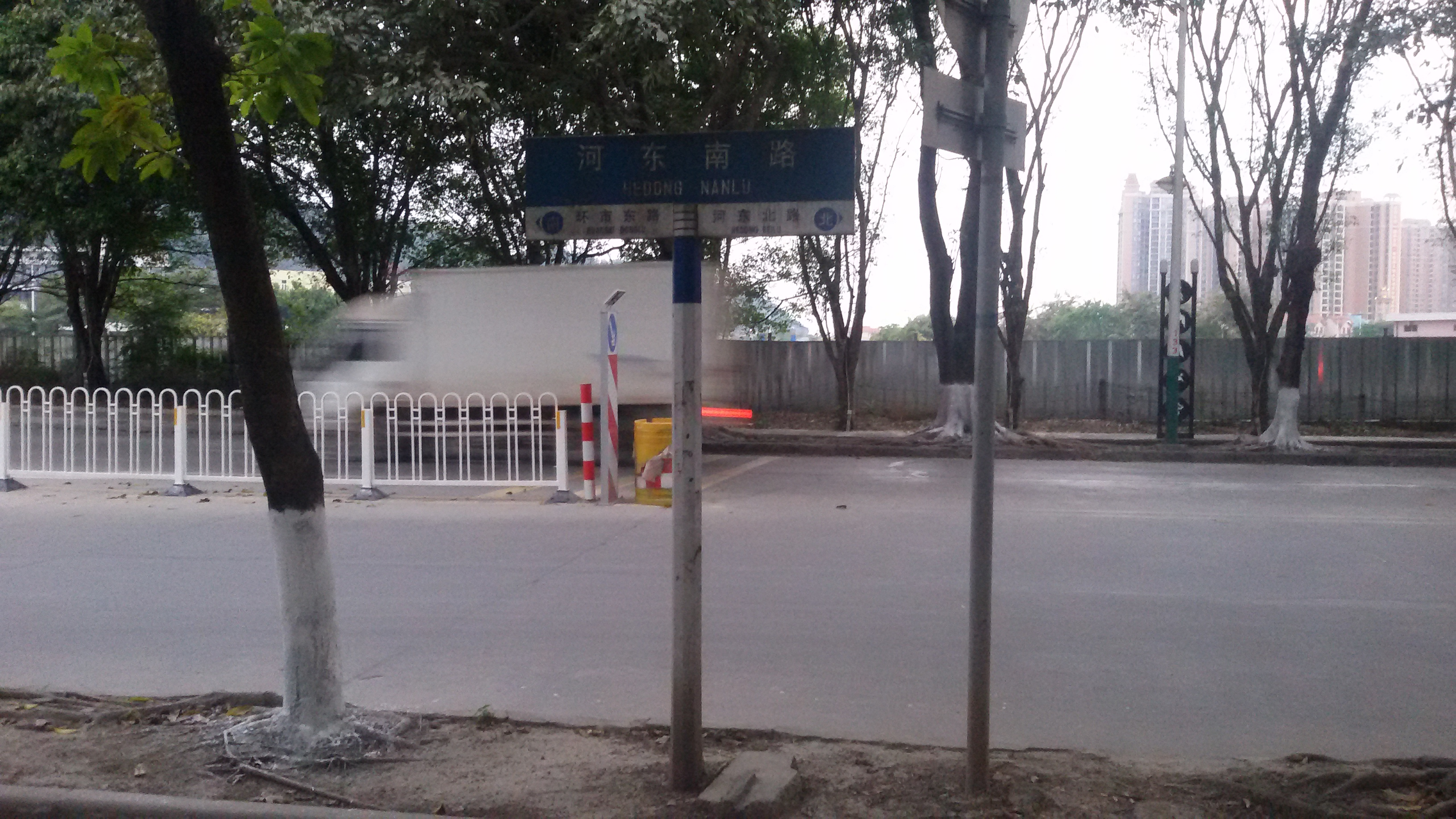 粵語: 河东南路嘅路牌